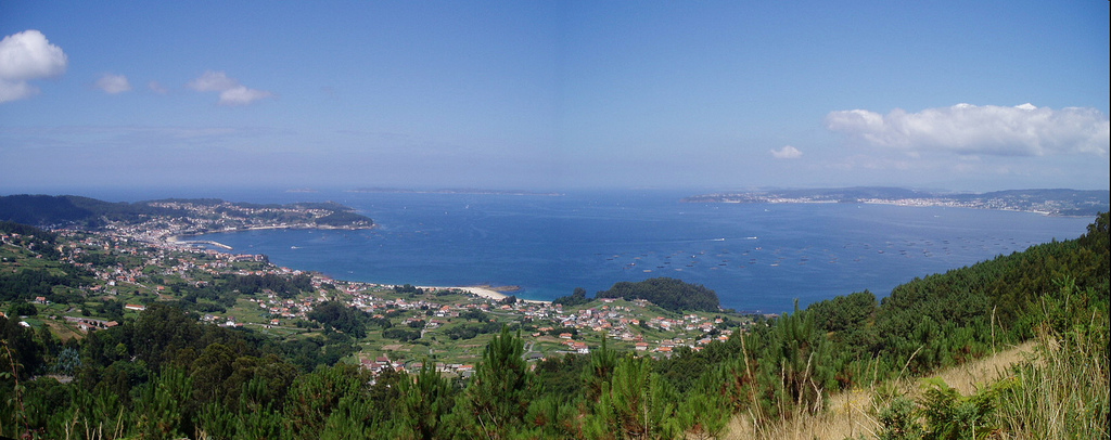 Panoramica del Municipio de Bueu y la Ría de Pontevedra